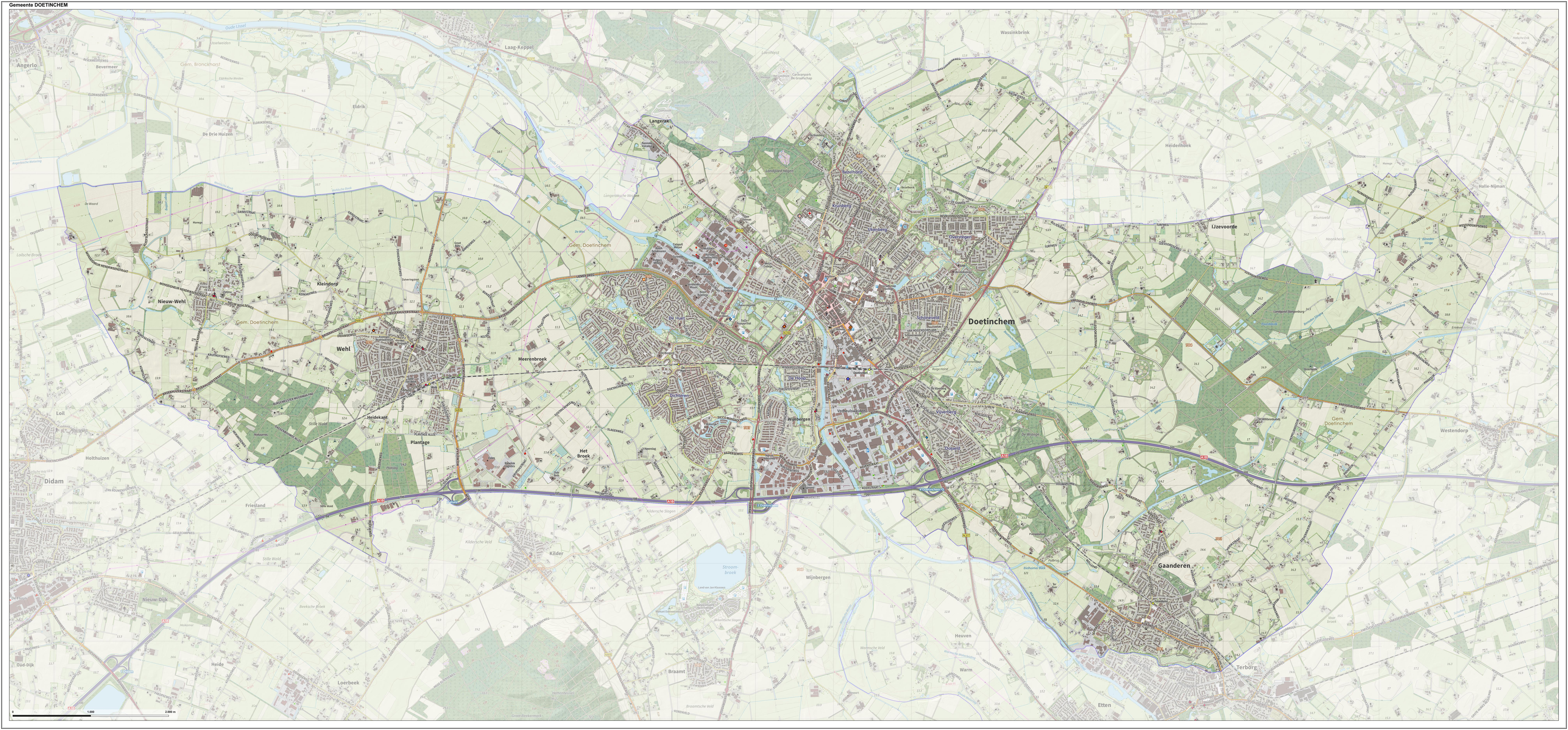 Topografische gemeentekaart. Resolutie: 400 pixels/km. Kaartbeeld samengesteld uit de open geodata van de Top10NL en Top25namen (Kadaster), Creative Commons-BY licentie. Gebouwvlakken uit open geodata BAG extract. Wegen uit de OpenStreetMap, OpenStreetMap community. Reliëfschaduw uit de Actuele Hoogtekaart AHN2. Samenstelling en kleurenschema: Jan-Willem van Aalst, met QGIS. Zie ook de Legenda.